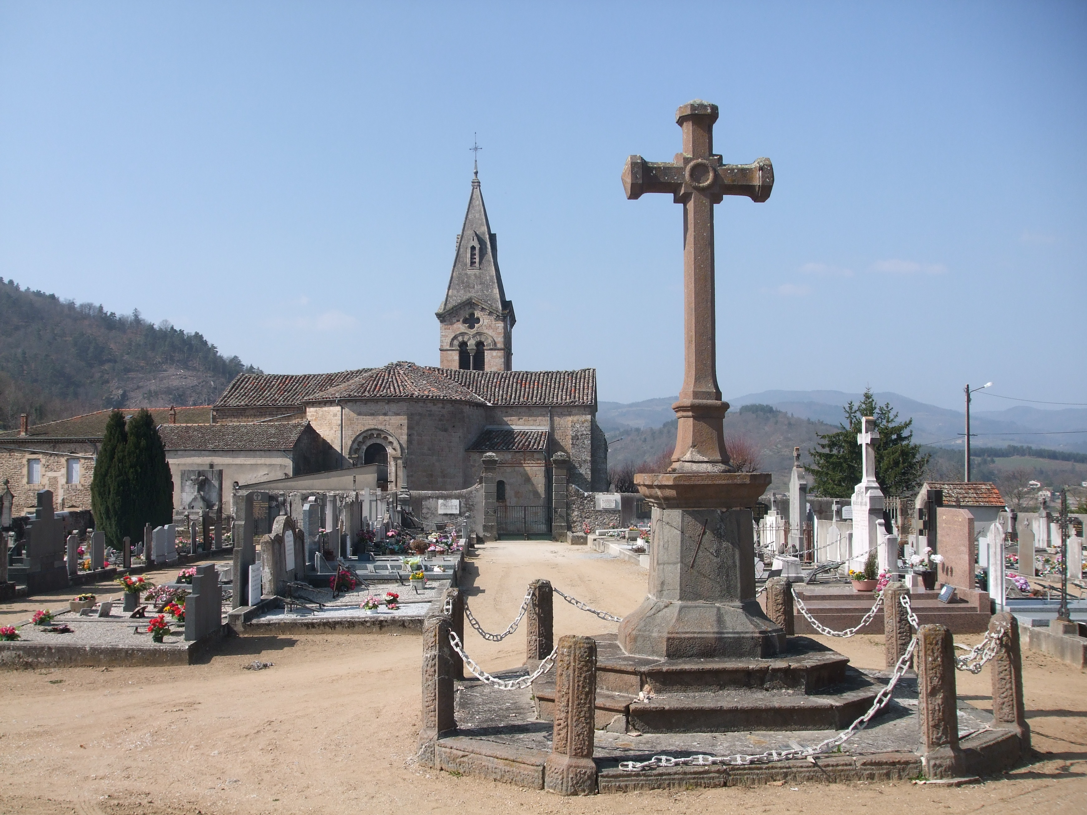 አማርኛ: église Saint Domnin